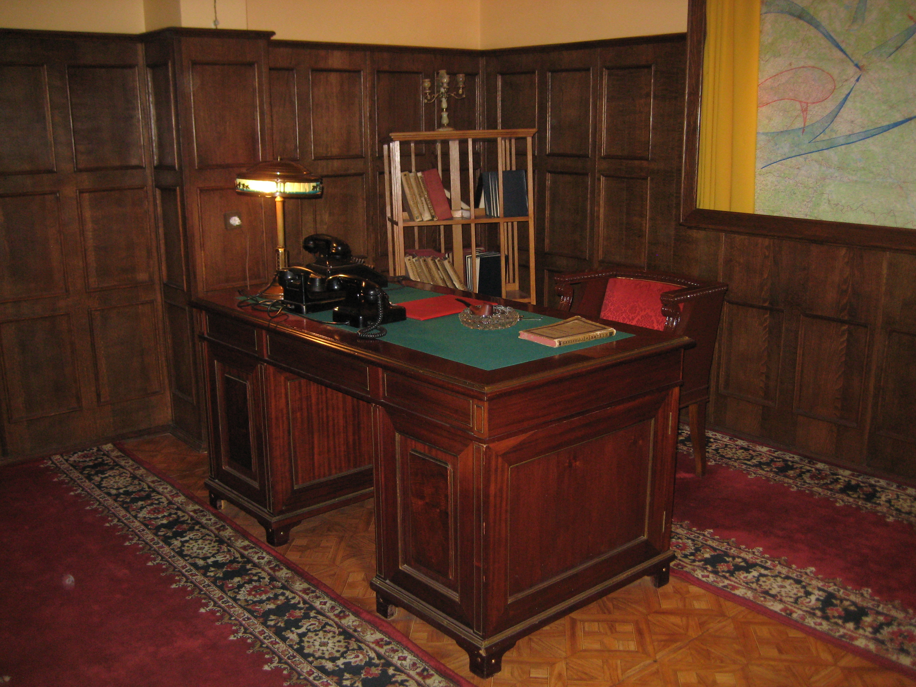 Pedestal desk in Joseph Stalin’s bunker in Izmaylovo